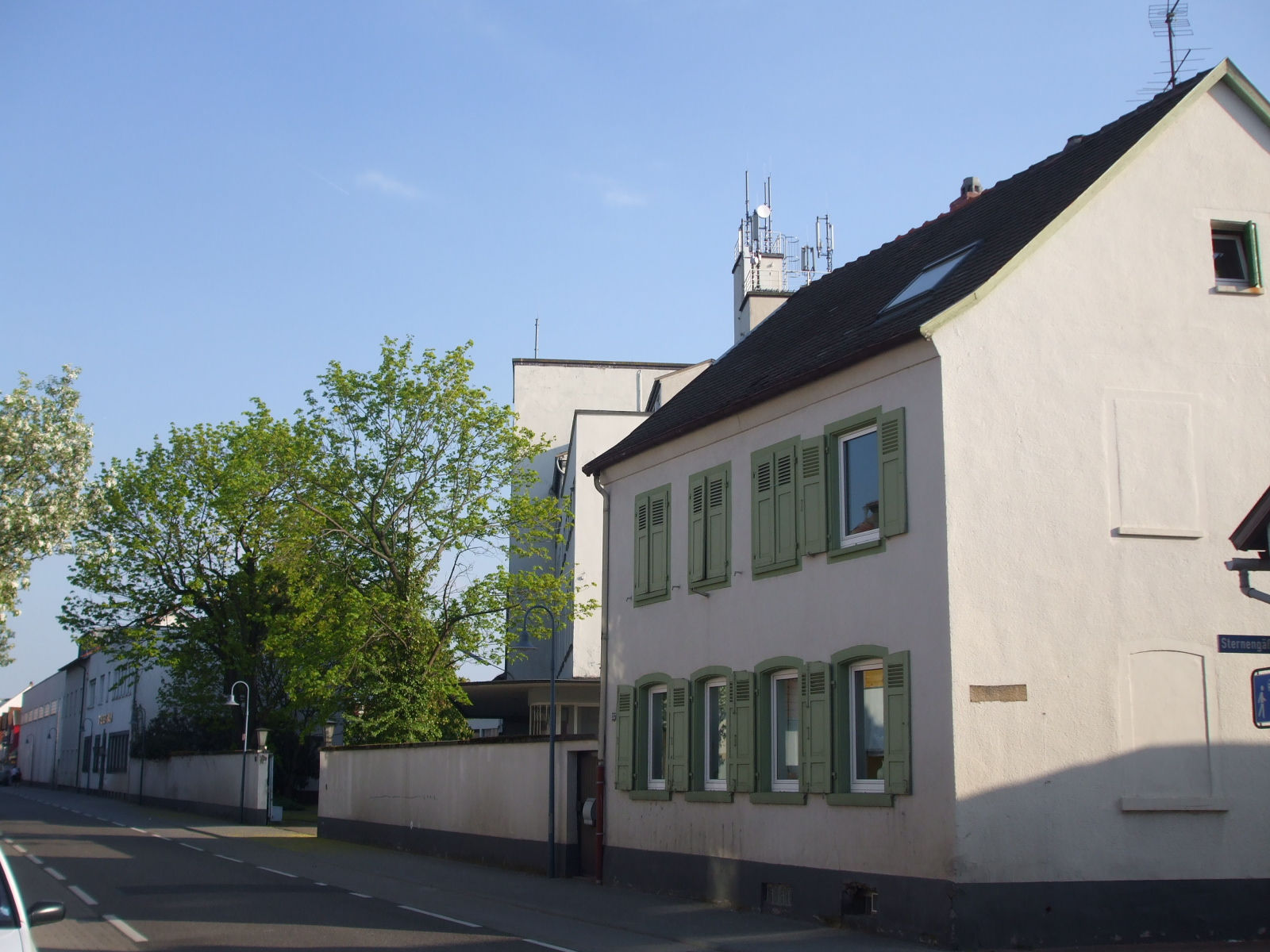 Brauerei Treiber, ehemaliges Brauerhaus an der Wormser Straße blieb als einziges erhalten